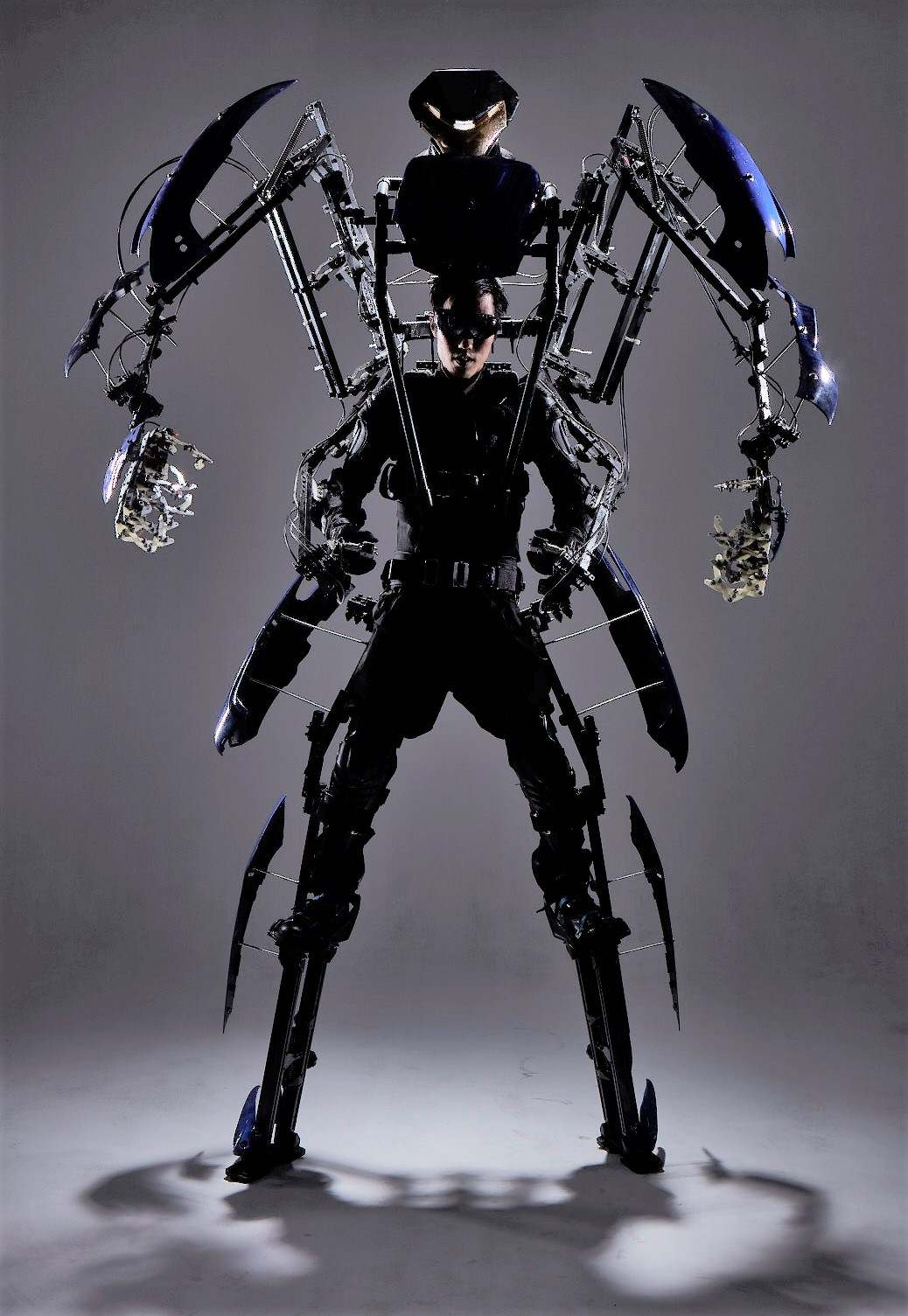 SKELETONICS 巨大外骨格デバイス